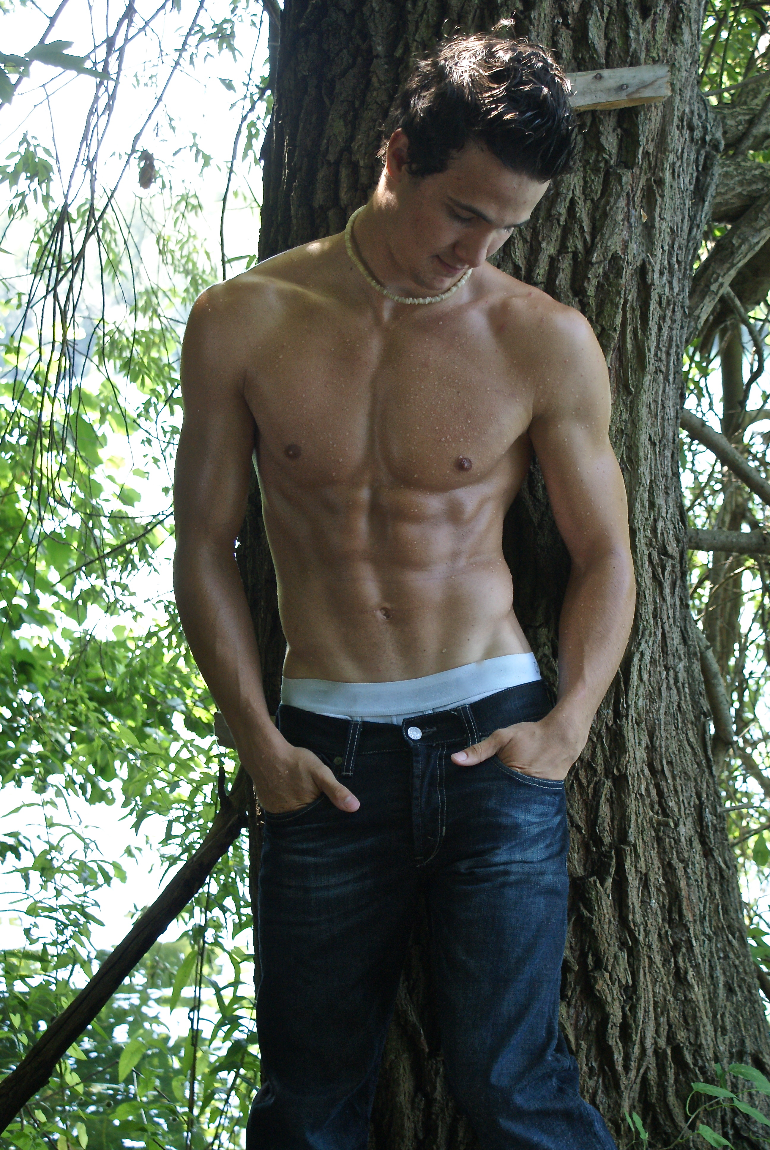 Mann mit Sixpack, Model: Kevin Görner